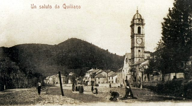 Panorama ottocentesco di Quiliano, Liguria, Italia